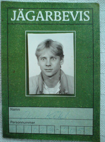 Jägarexamen